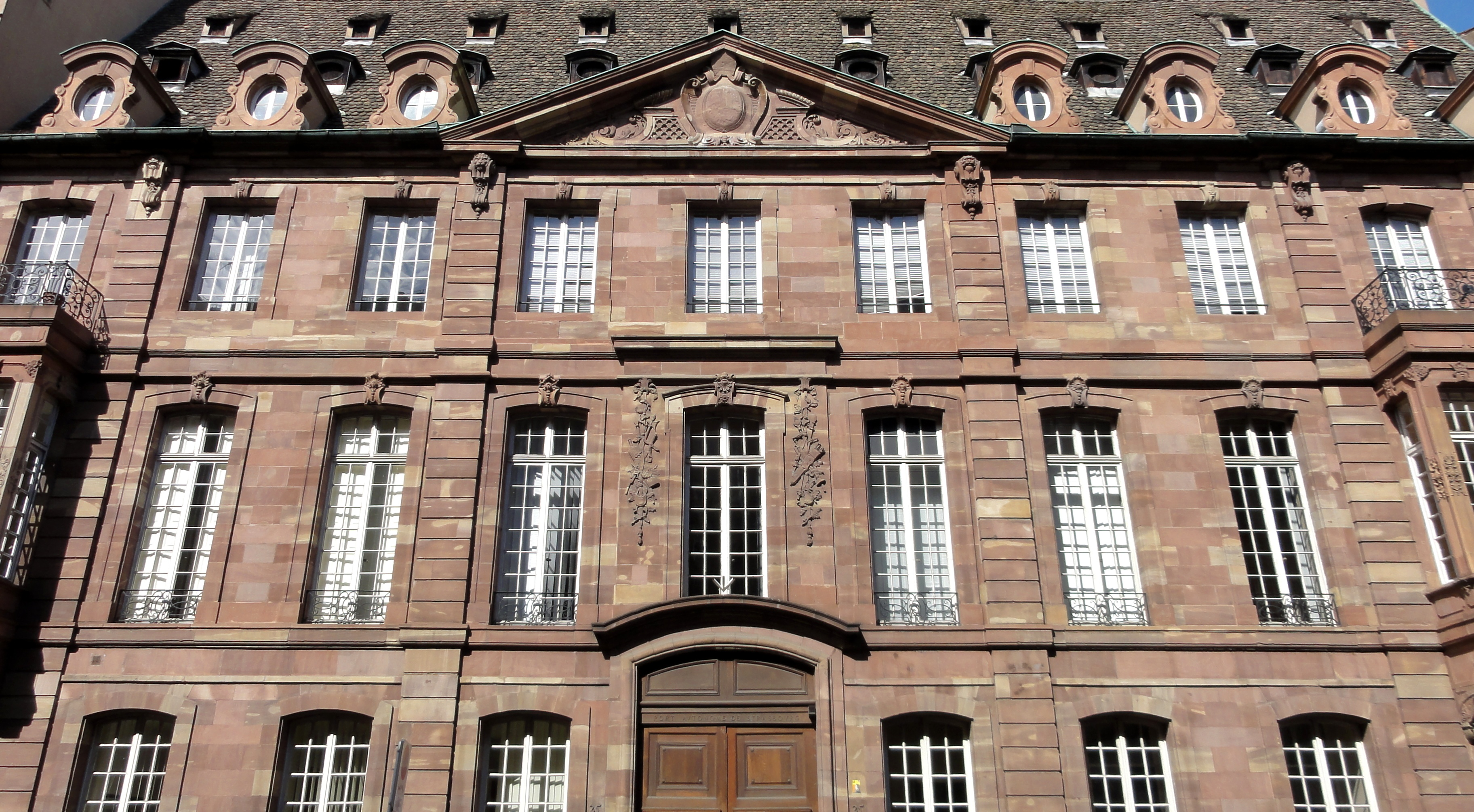 Alsace, Bas-Rhin, Strasbourg, Hôtel d'Andlau-Klinglin (XVIIIe), 25 rue de la Nuée-Bleue. .